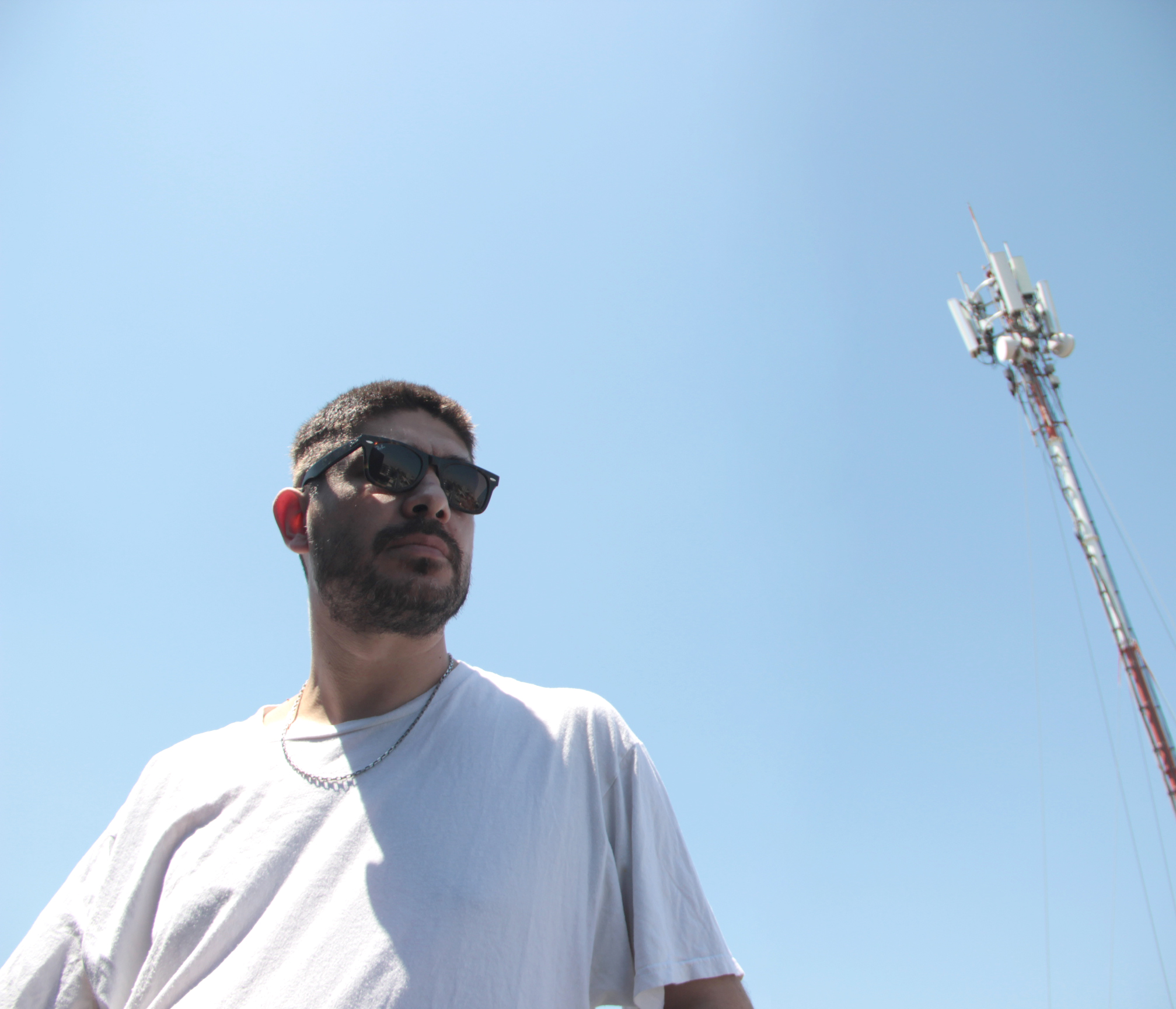 Godoy en la terraza de VFE584